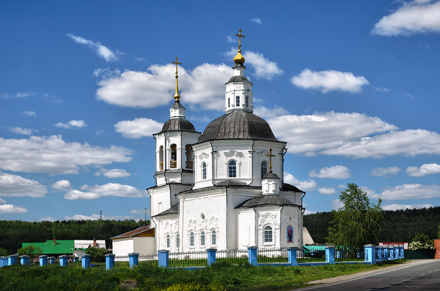 Спасская церковь (Томская область, Томск, село Коларово)